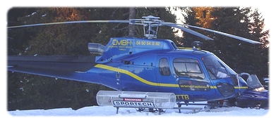 Photographie d'un des hélicoptères à Chamonix utilisé par le Chamonix-Mont-Blanc Hélico. Photographie prise à Chamonix lors d'un vol de tourisme. Concernant l'image je l'ai recadré et j'y ai appliqué un encadrement opt. diapo.